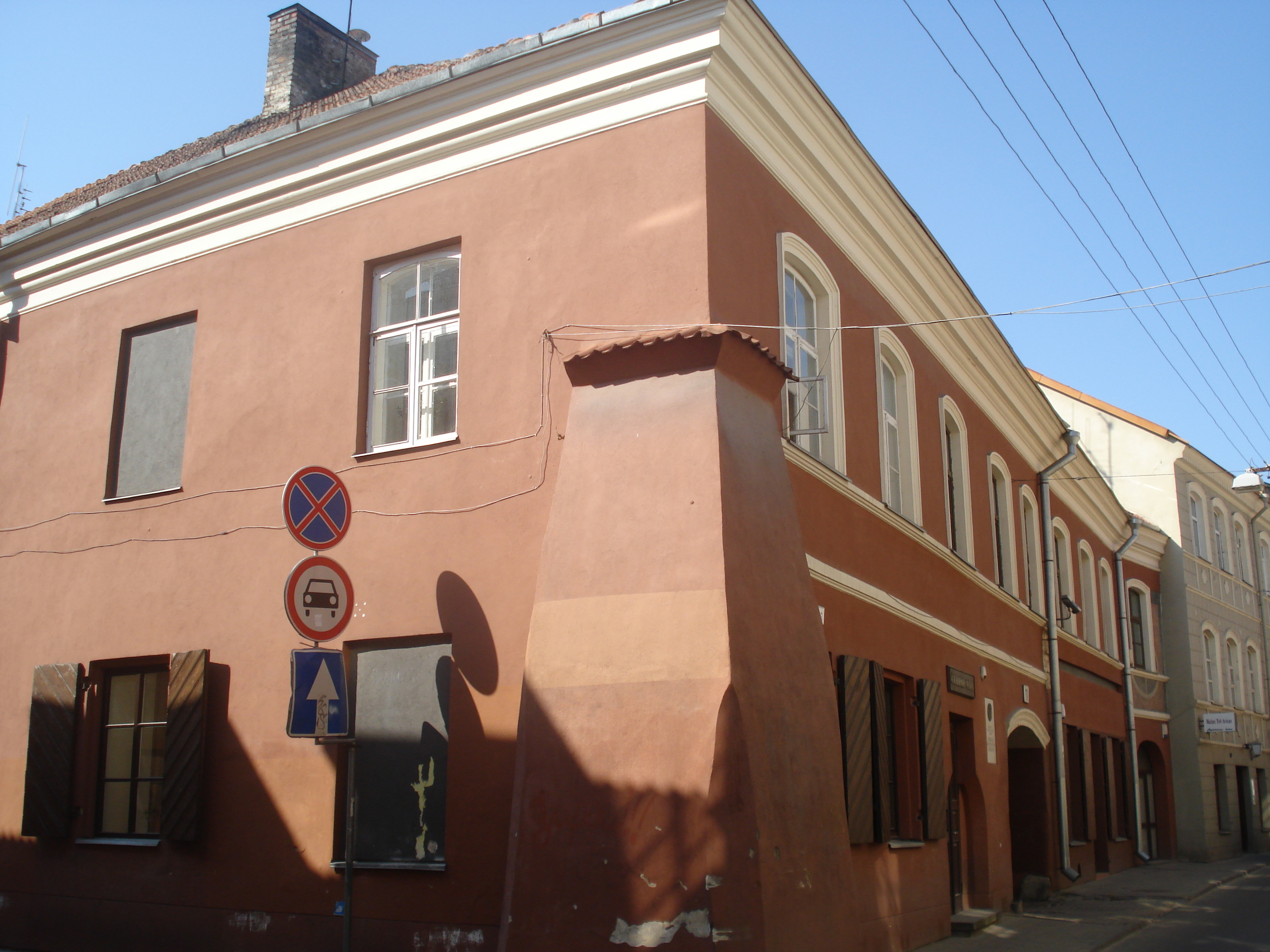 Savičiaus gatvė 11 (ulica Sawicz) in Vilnius